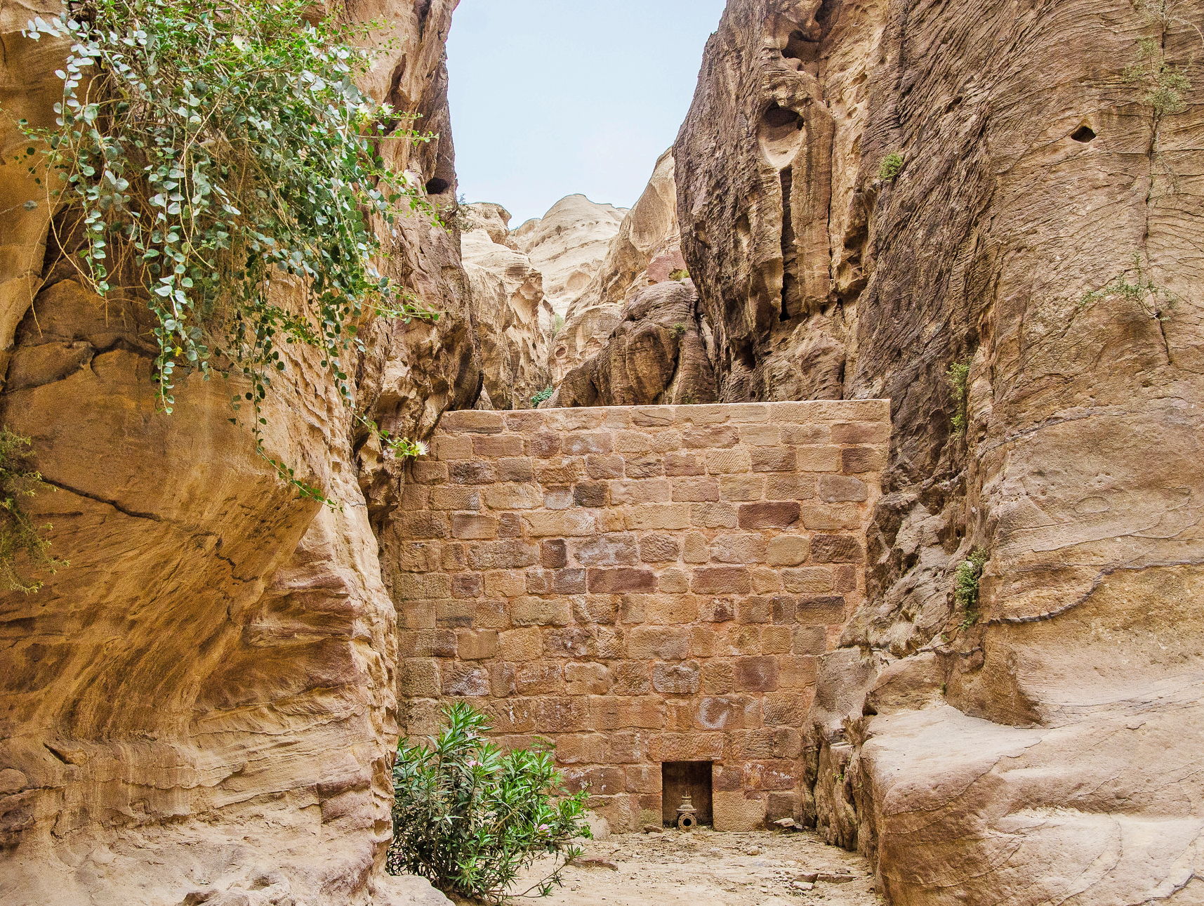 Barrage (re)construit au bas d'un wadi au environ de Pétra.